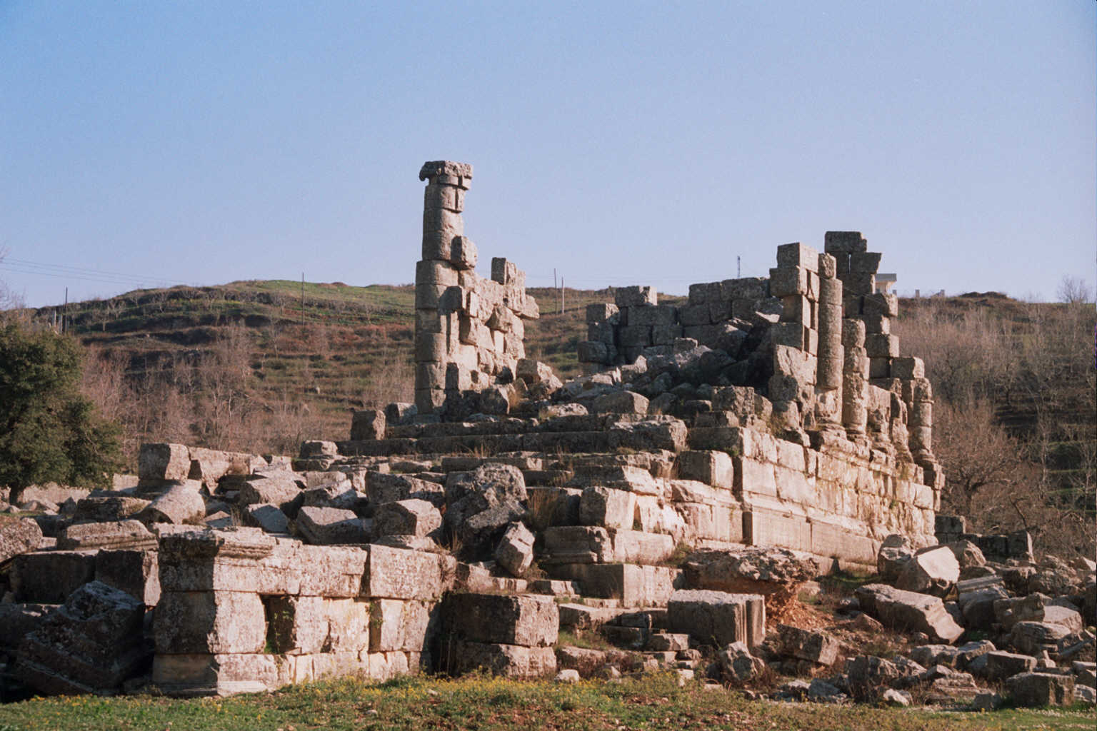 Hosn Suleiman - Siria Tempio di Zeus